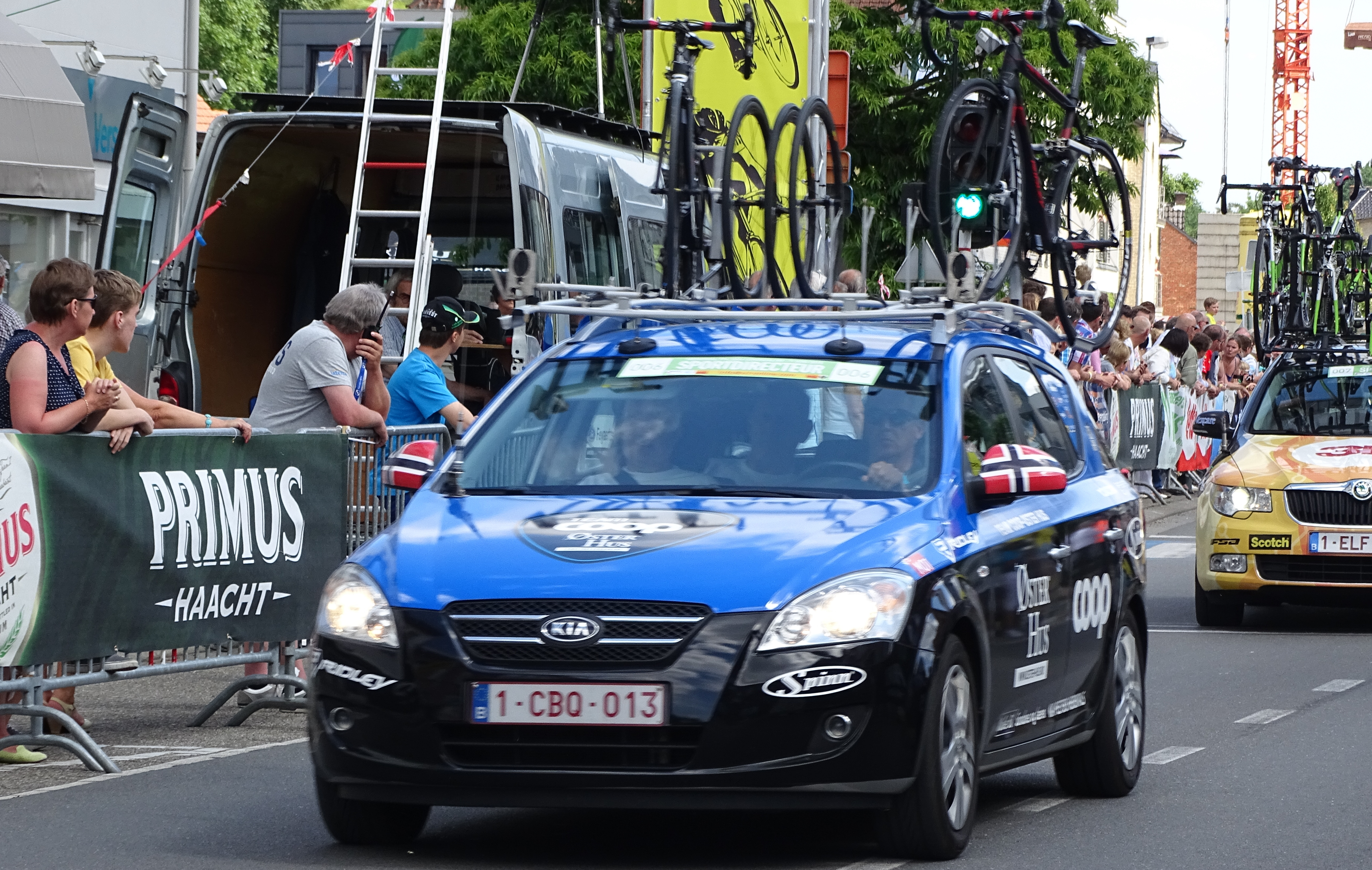 Reportage réalisé le dimanche 7 juin à l'occasion de l'arrivée du Mémorial Philippe Van Coningsloo 2015 à Bonheiden, Belgique.